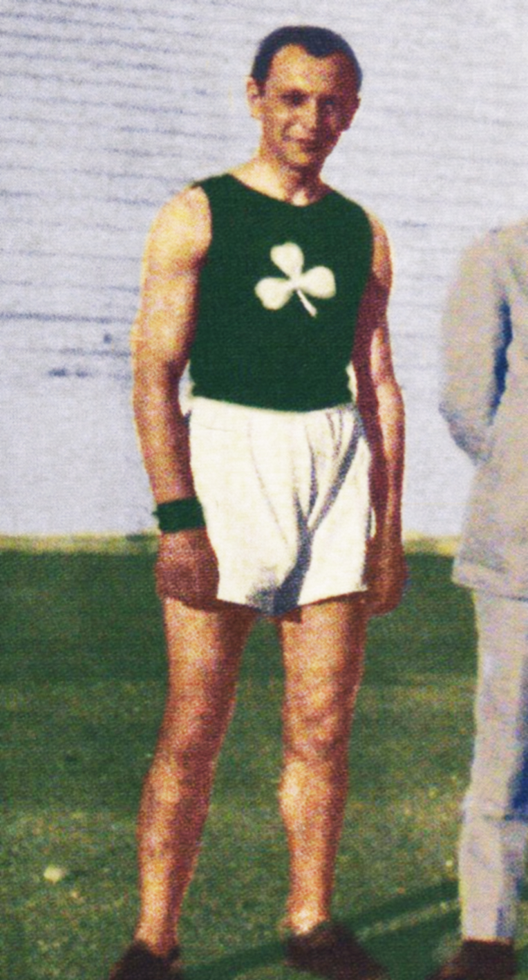 Ο Απόστολος Νικολαΐδης το 1919 στο Παναθηναϊκό Στάδιο. Χρωματική επεξεργασία από το χρήστη Sportingn